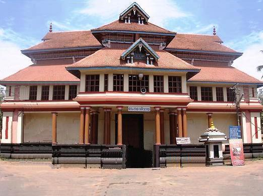 Chengannoor temple